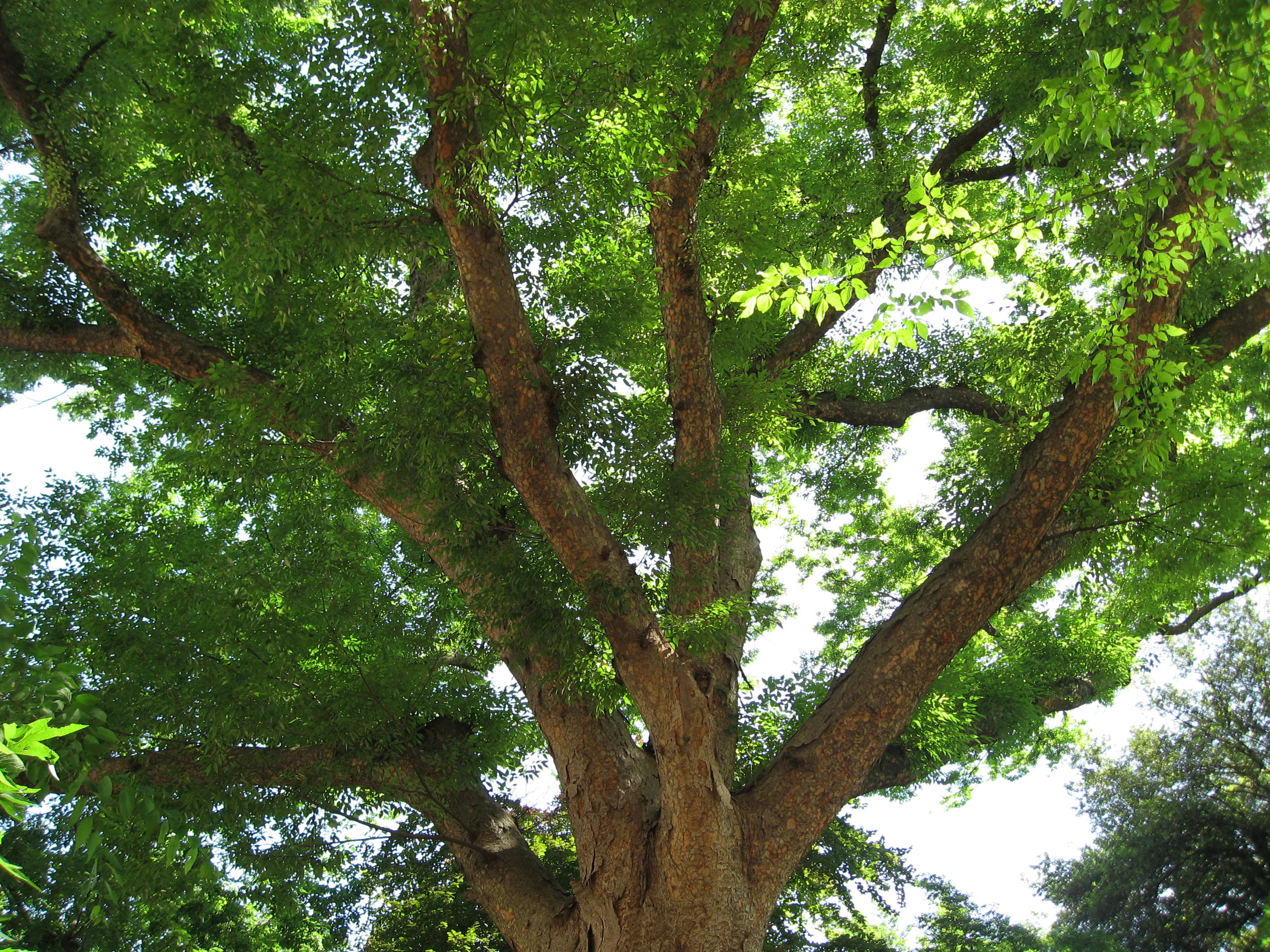 Zelkova serrata in Giardino dei Semplici di Firenze Map: 43° 46' 45" N 11° 15' 39" E